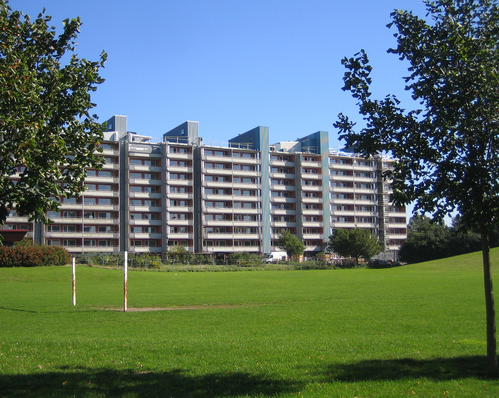 Kryddgården, Malmö, Sweden